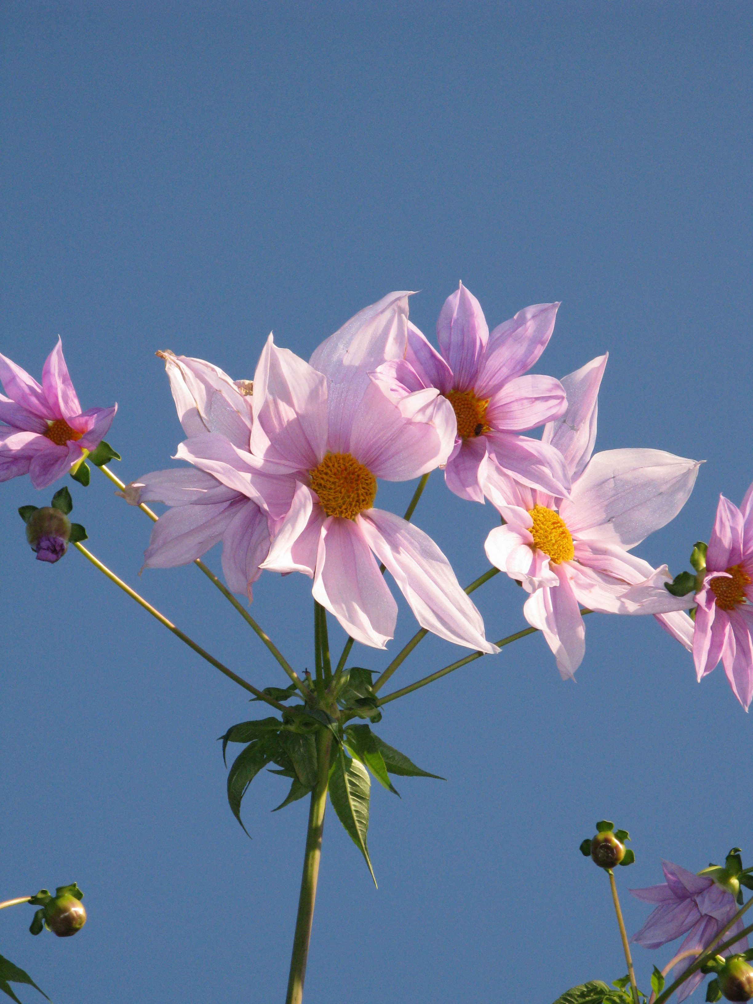 Dahlia imperialis